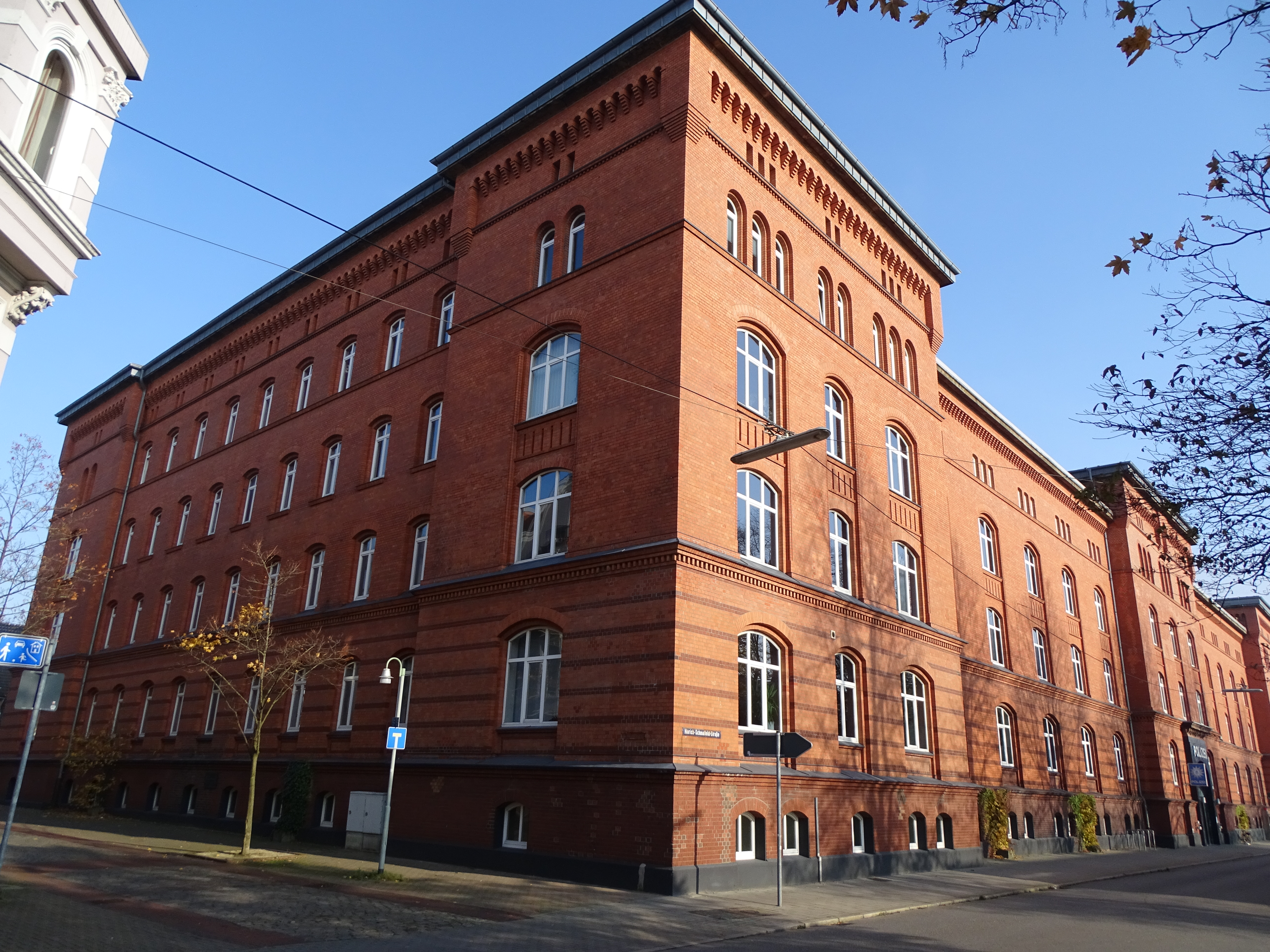 West- und Südseite des Stadthauses 6 (Ortspolizeibehörde) Bremerhaven. In der NS-Zeit Staatspolizeistelle Wesermünde (1933/1934). Für die alten Bremerhavener ist es immer noch „Block 4“.